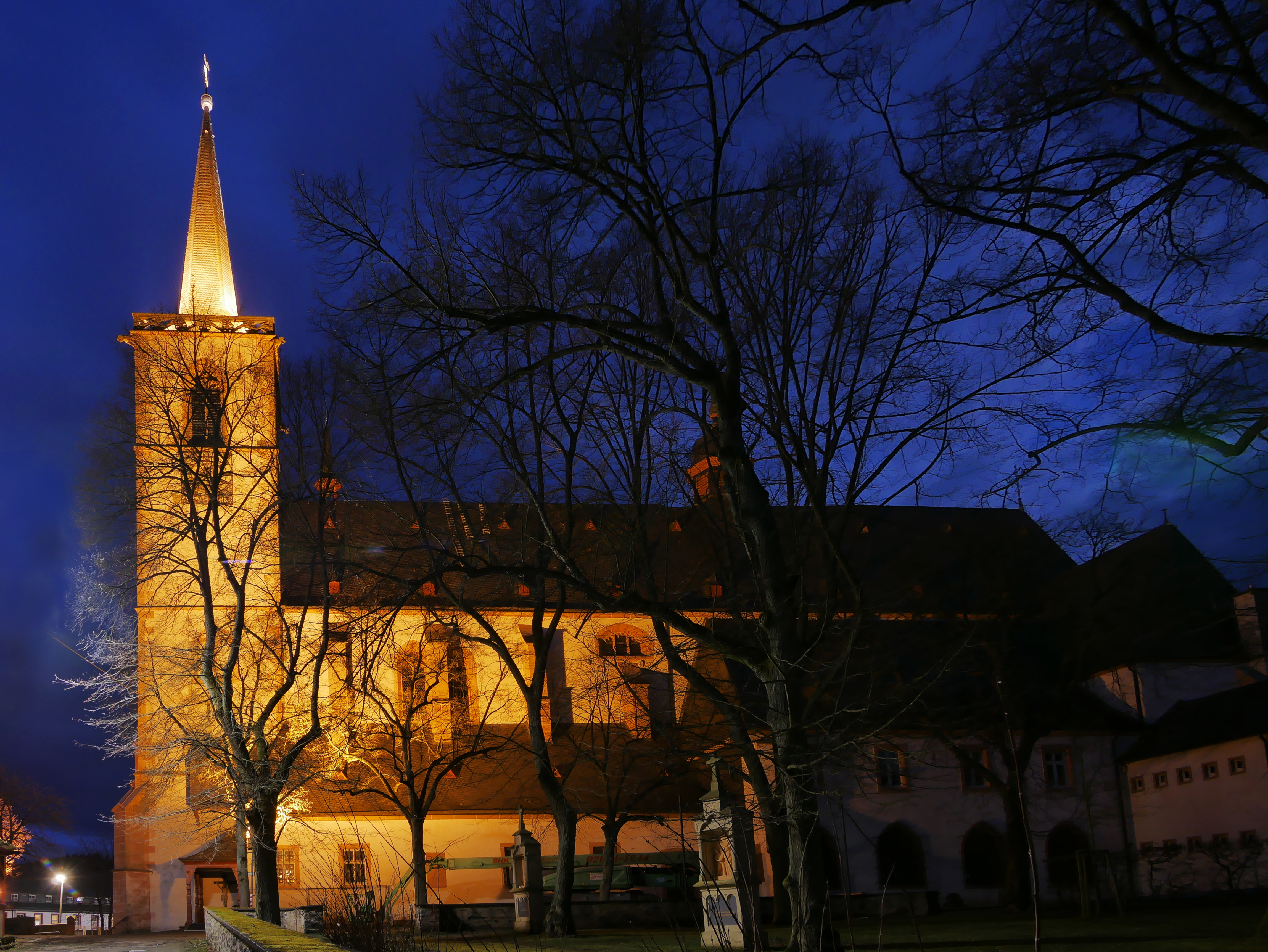 Marienwallfahtskirche Klausen (Eifel) in dern Blauen Stunde .